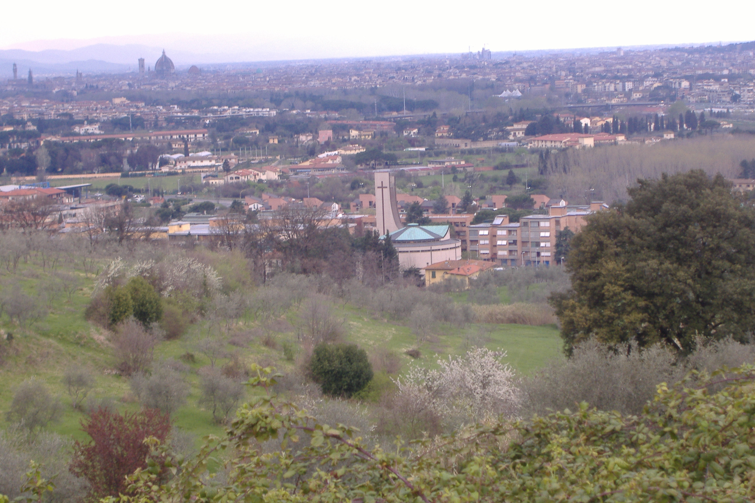 Stefano Nesti, foto personale, Panorama di bagnoa a ripoli con firenze sullo sfondo. Licensing Categoria:Bagno a Ripoli